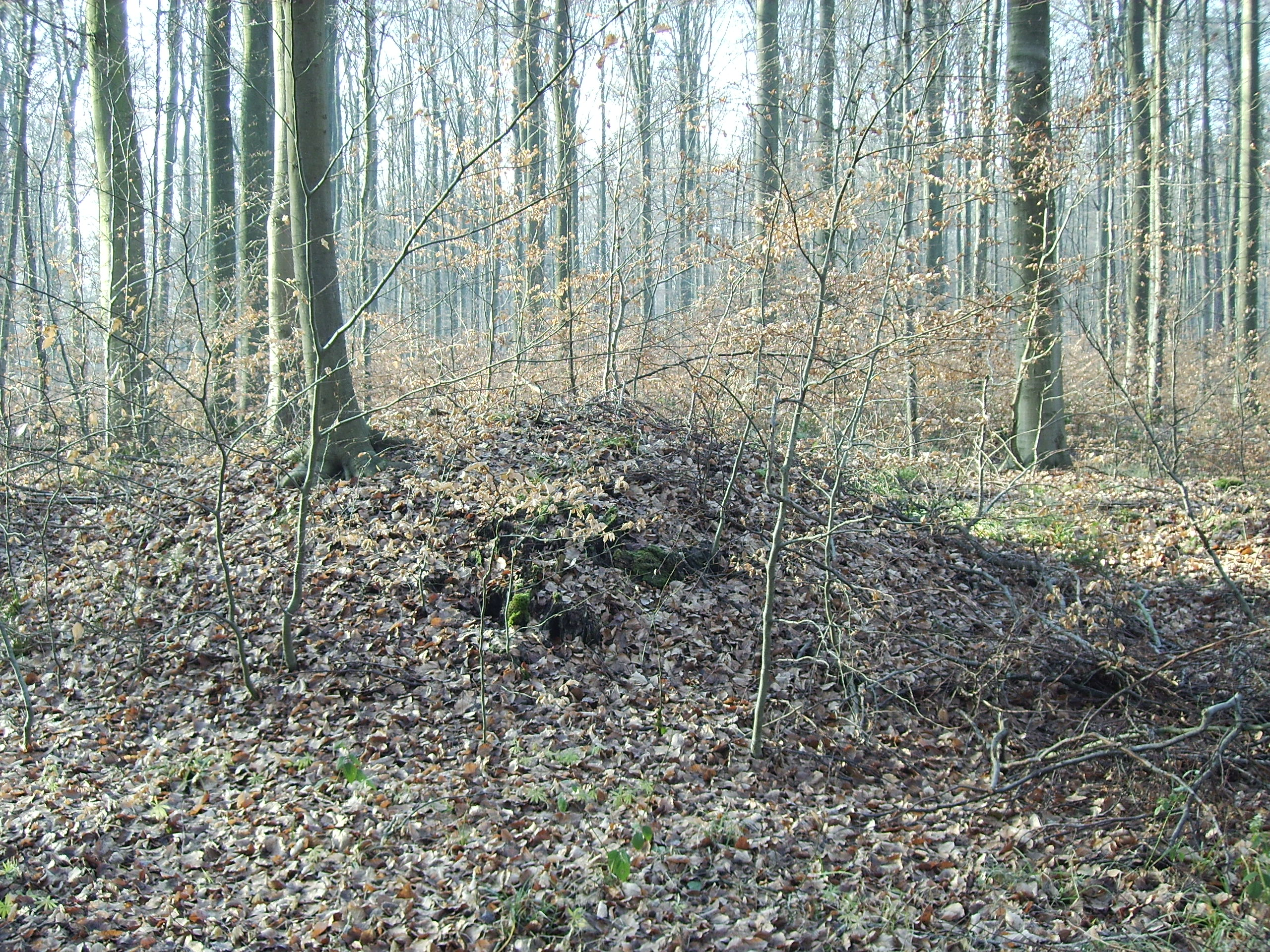 Hügelgrab Sinsheim, 3 Bückel